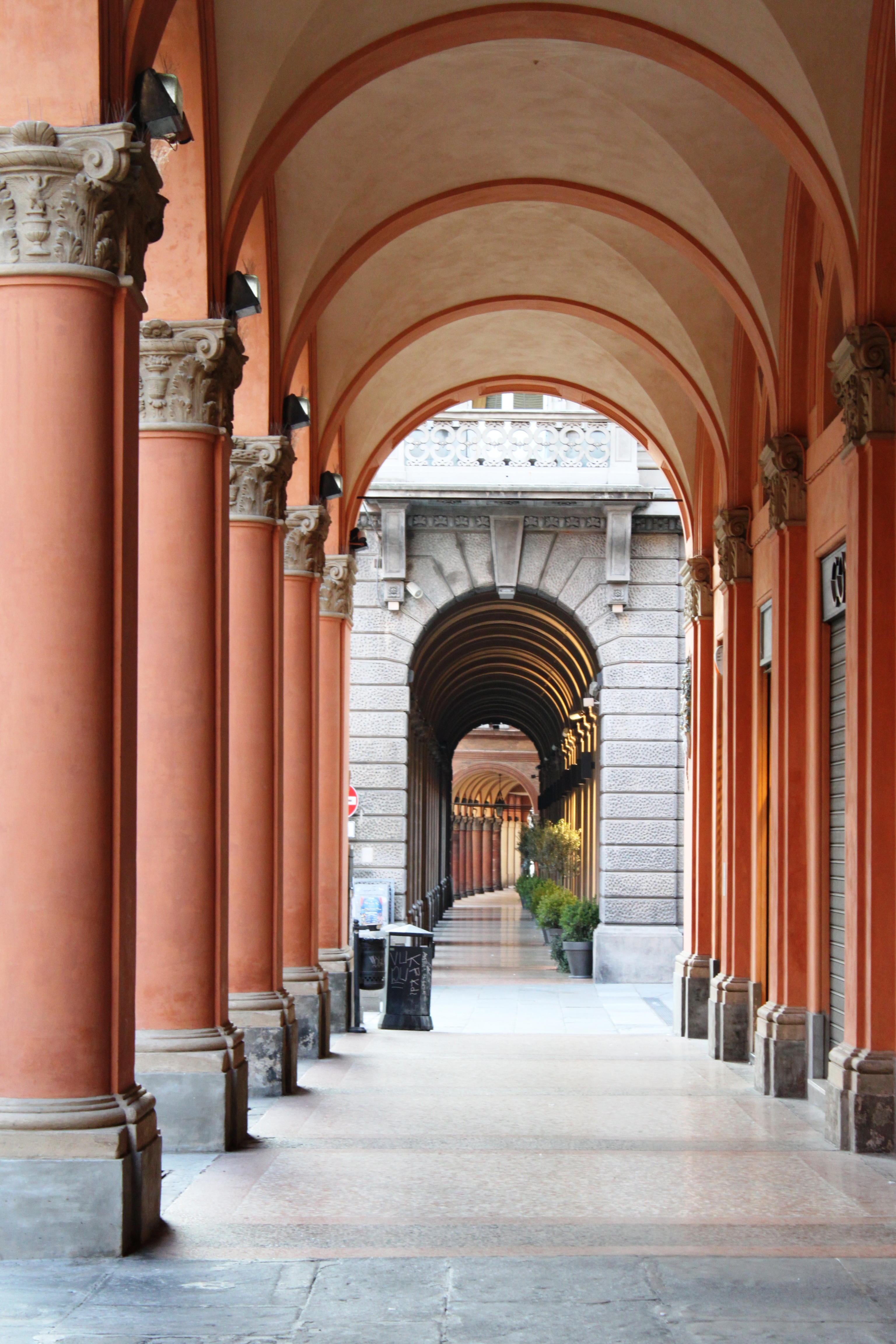 Portico di Via Farini This is a photo of a monument which is part of cultural heritage of Italy.